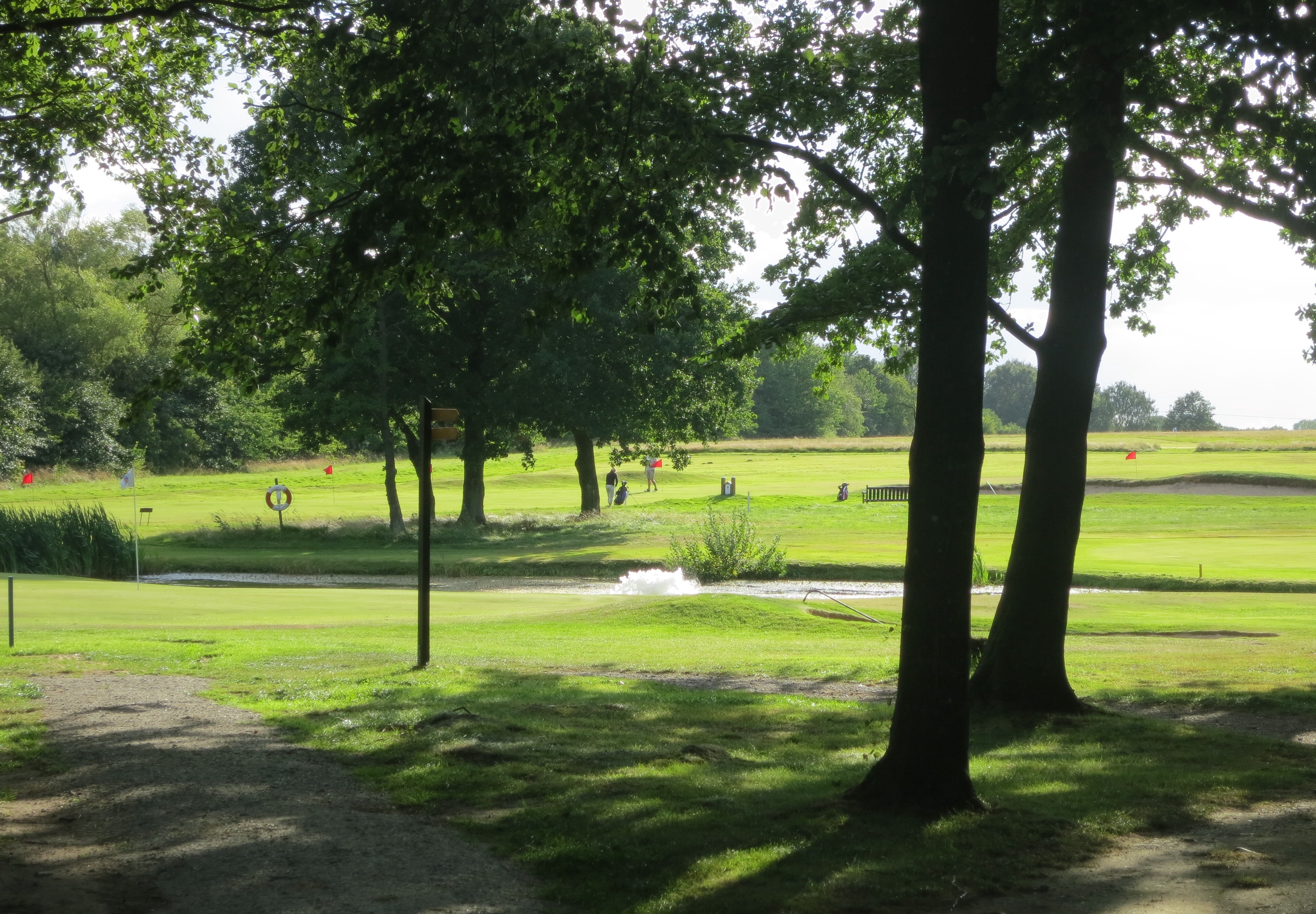 Kungsmarkens golfbana